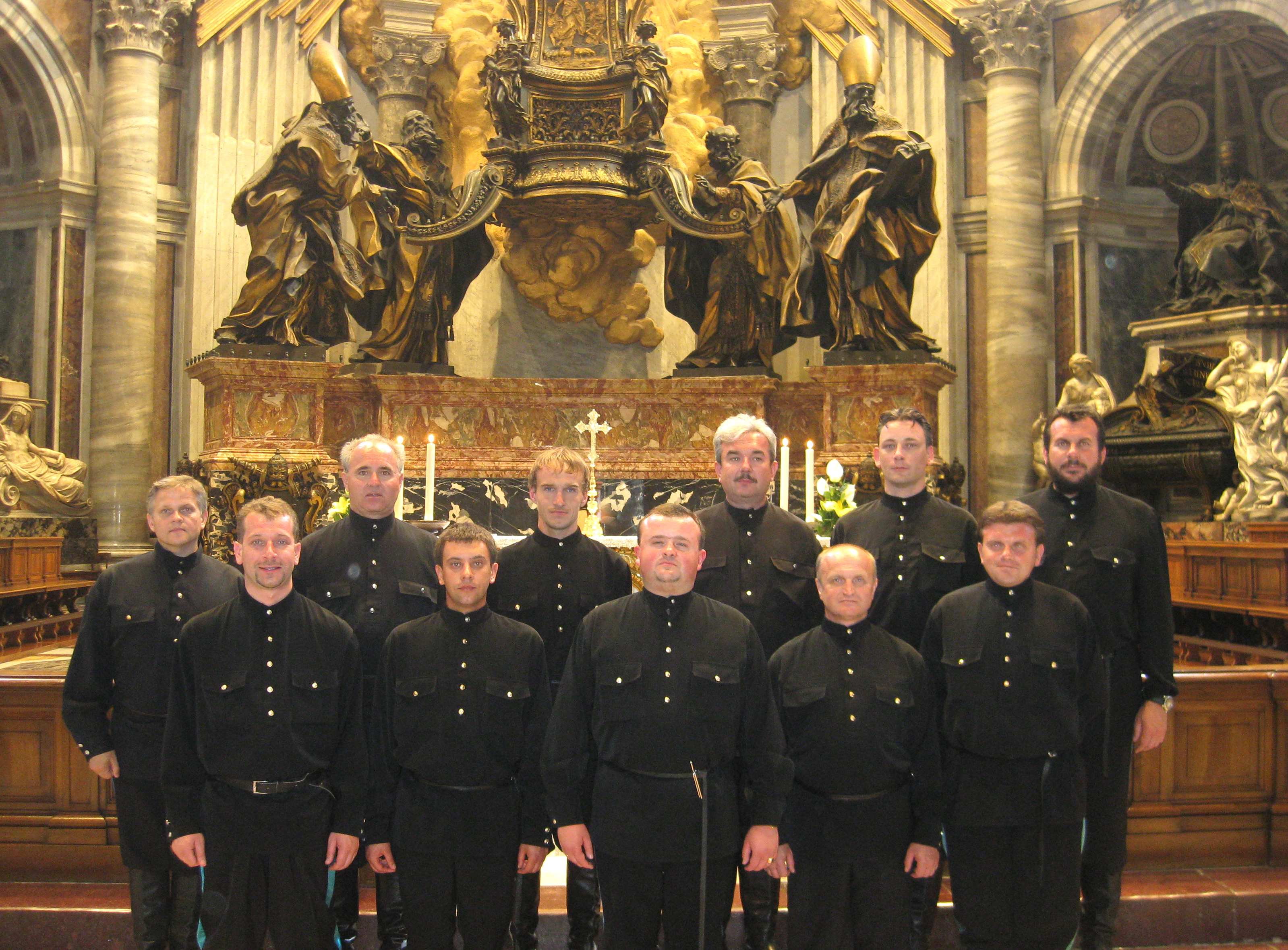 Der Ural Kosaken Chor nach der musikalischen Gestaltung der Frohnleichnamsmesse im Petersdom 2009